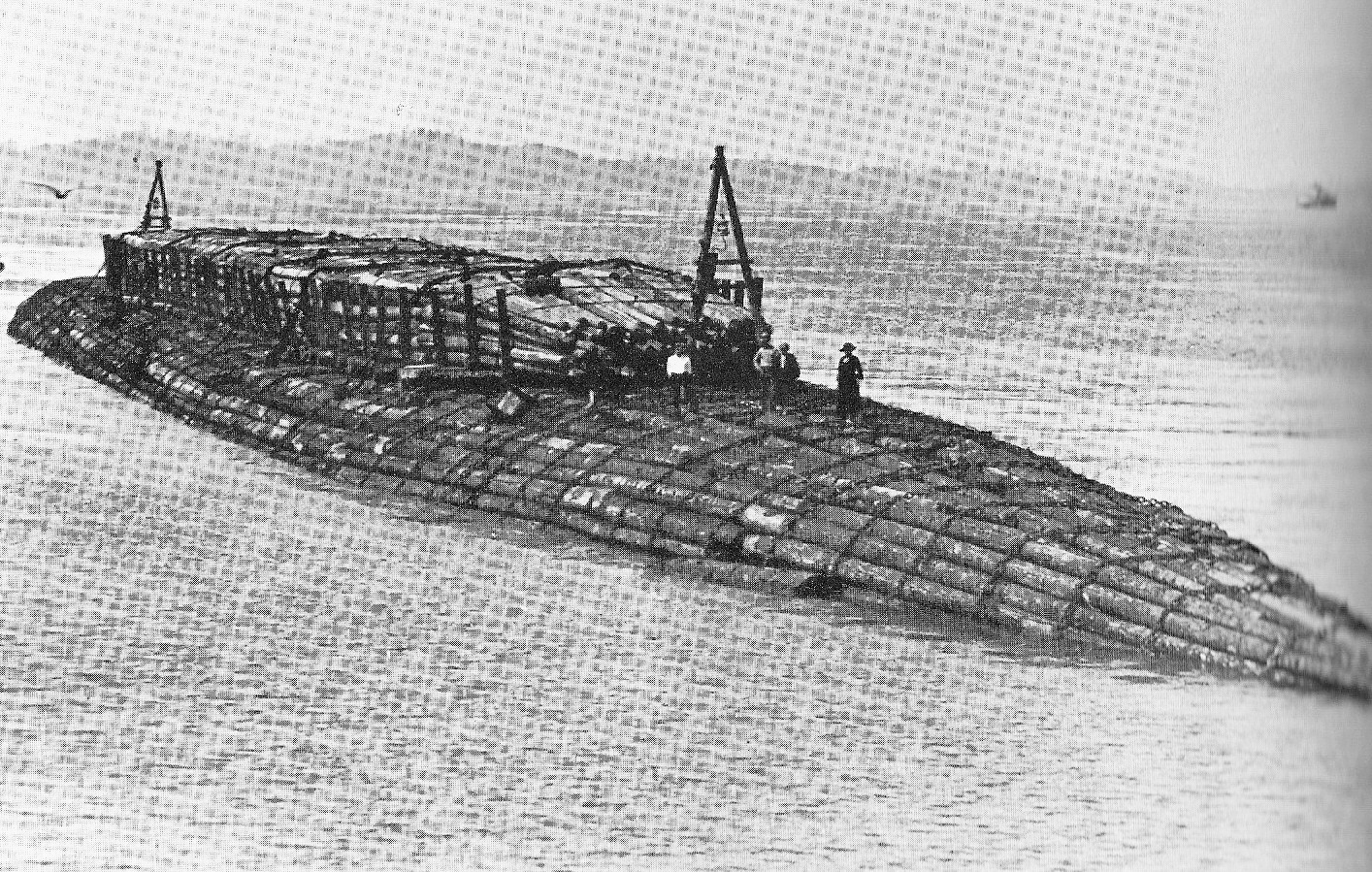 Benson "cigar raft" passing Hammond, Oregon.